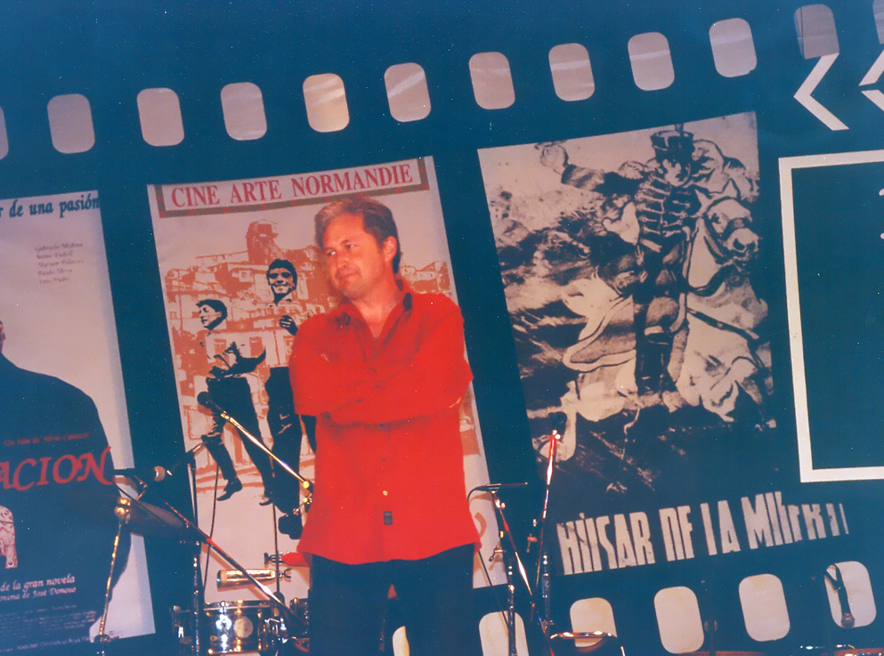 Director Cristian Galaz; Película El Chacoteero sentimental; año 2000